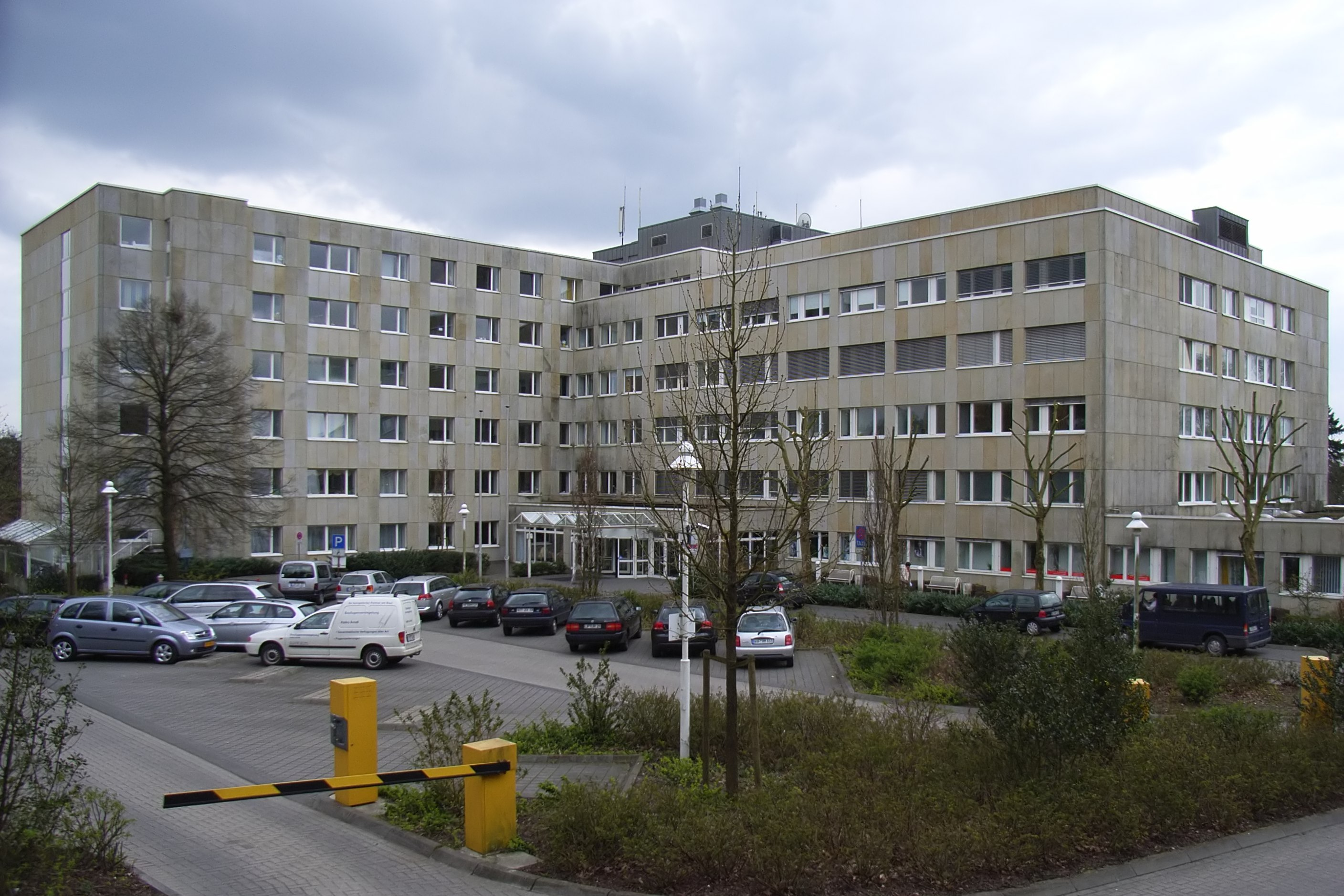 Bielefeld, Deutschland: Klinikum Rosenhöhe.